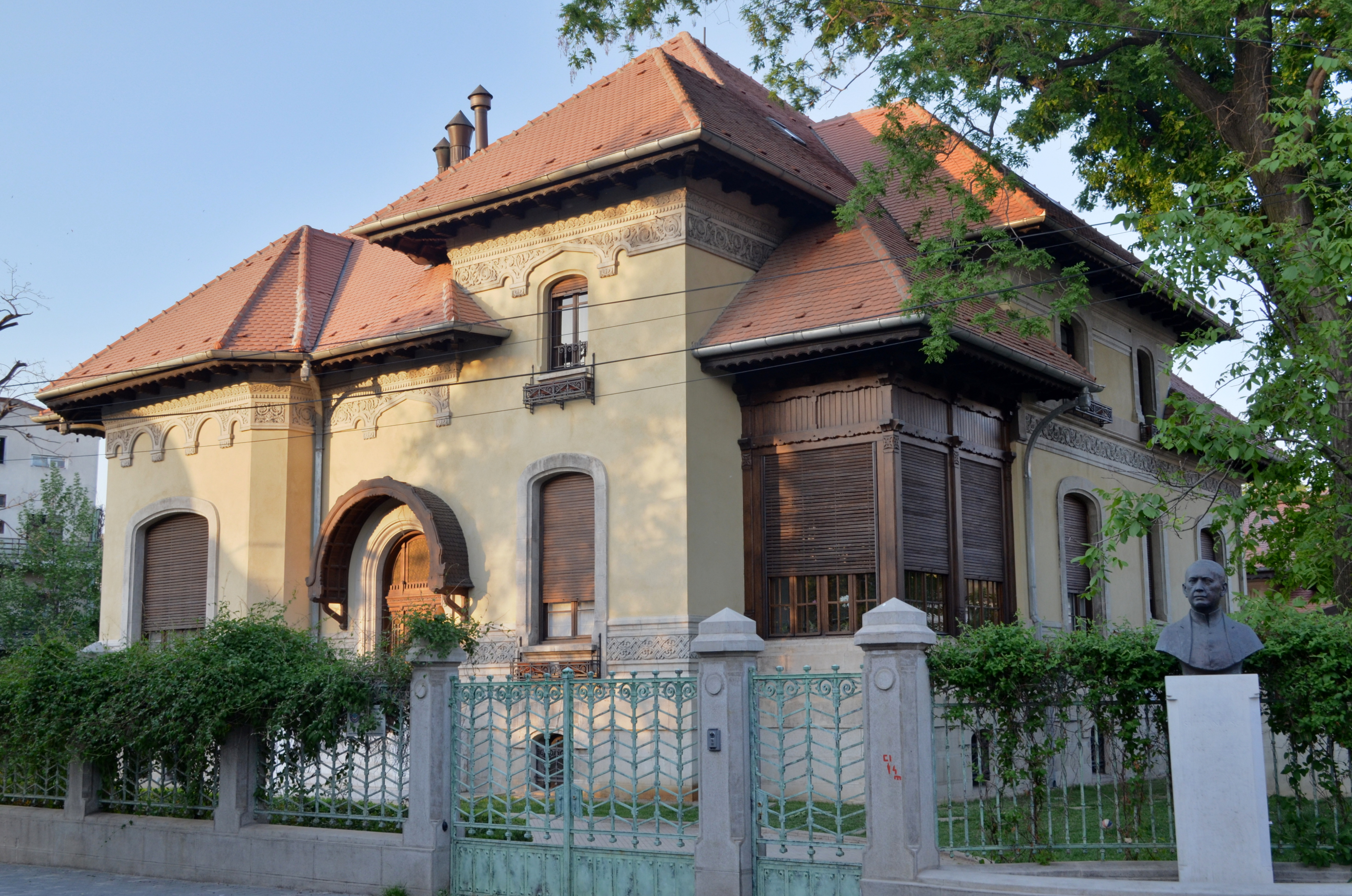 Casă, Strada Romulus nr. 77, Sector 3, București